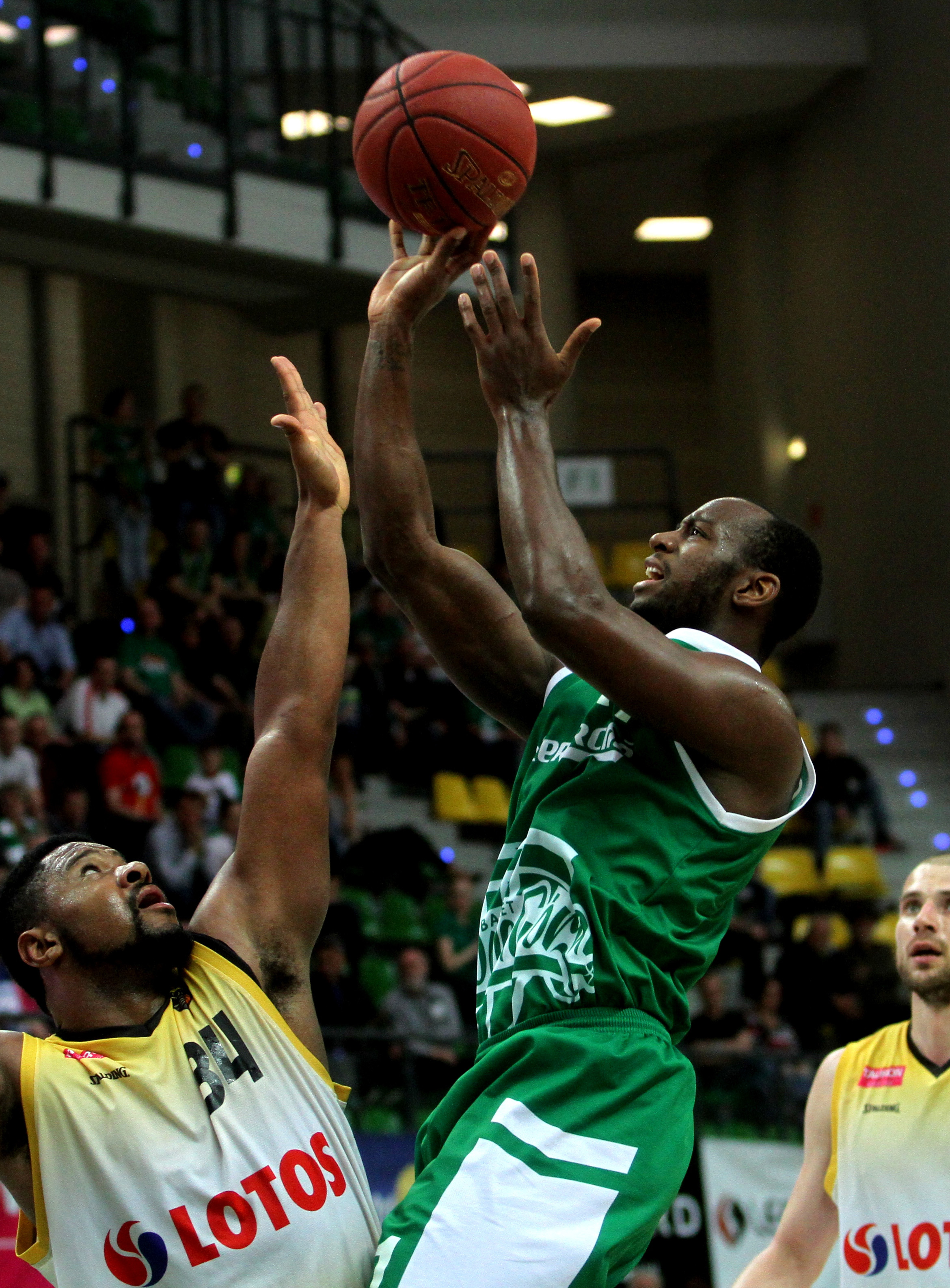 Marcus Ginyard Stelmet Zielona Góra